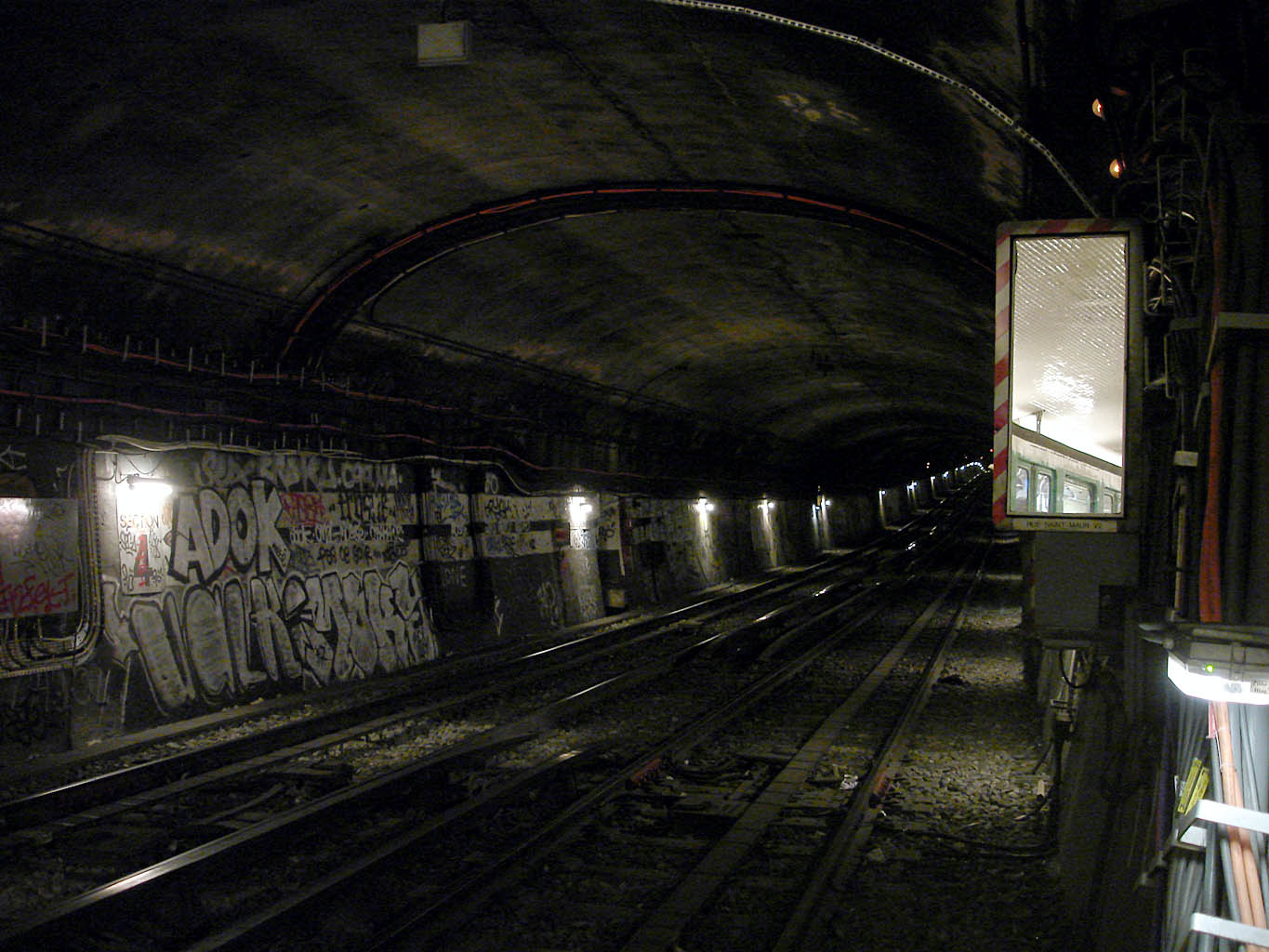 Station Rue Saint-Maur de la ligne 3 du métro de Paris, France. Le tunnel en direction de Gallieni.